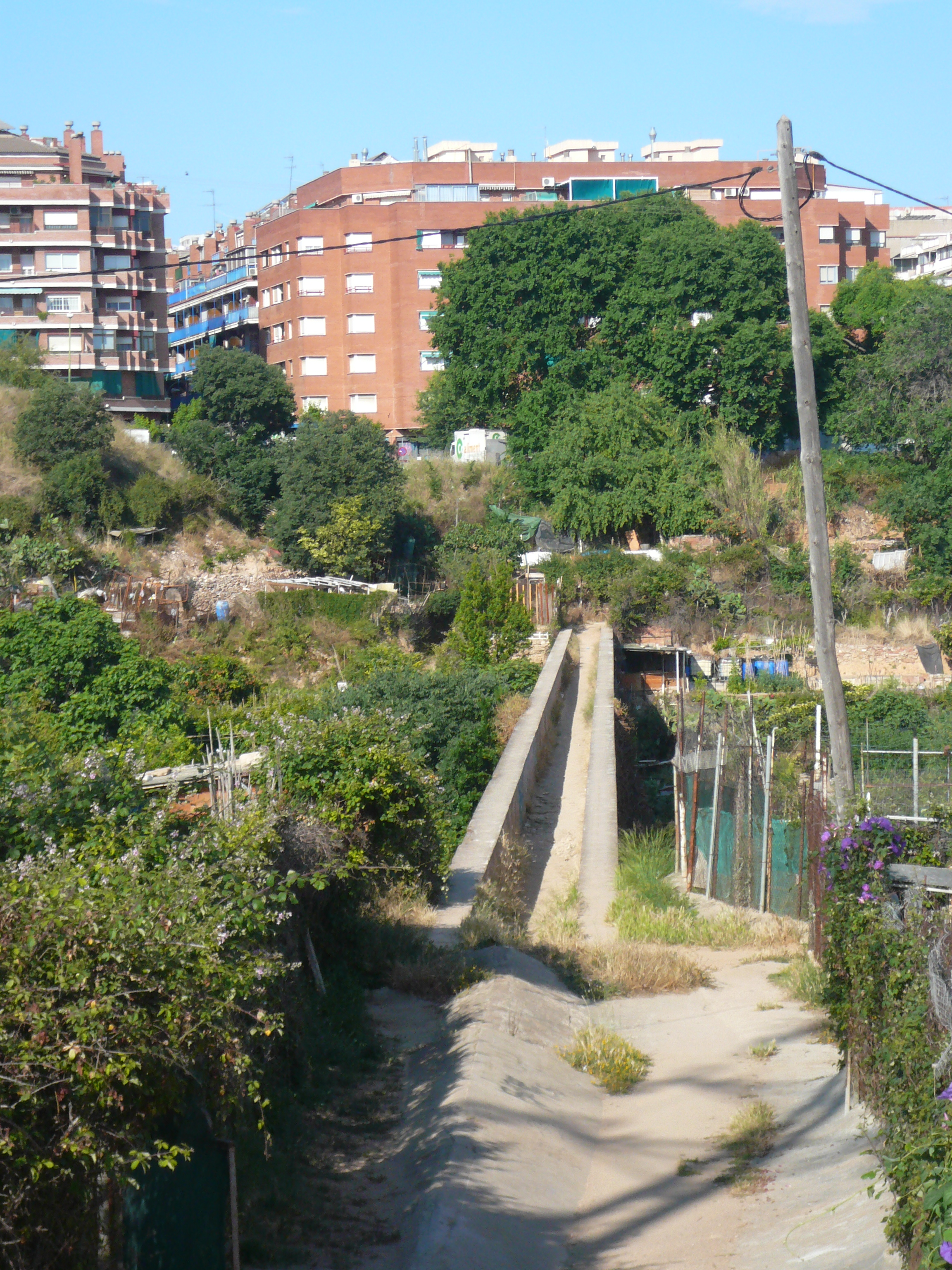 Aqüeducte sobre el torrent de Can Clota. Torrent de Can Clota (Esplugues de Llobregat). Object location41° 22′ 11.11″ N, 2° 05′ 42.93″ E